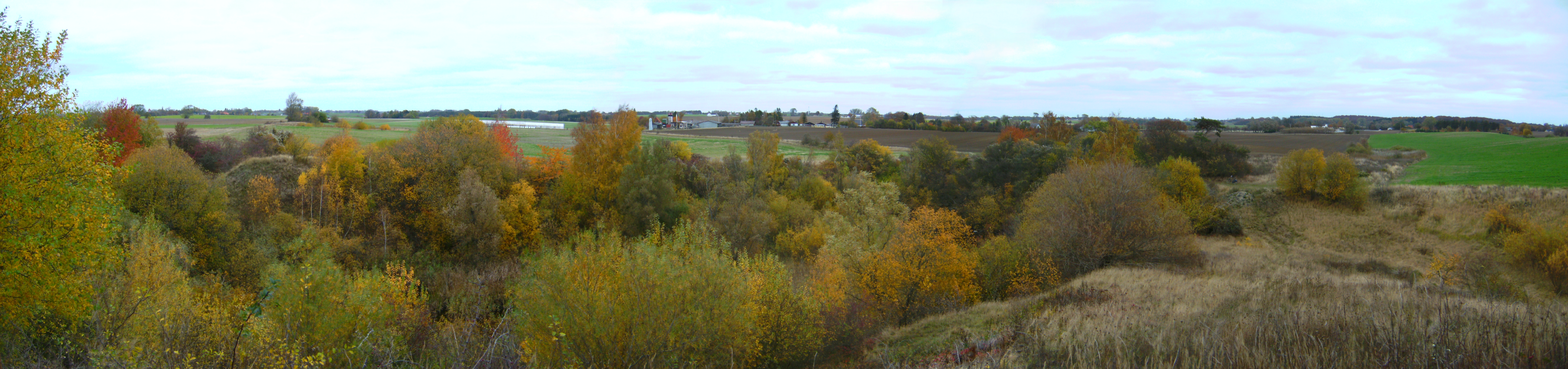 Oldtidsgrav i ved Herritslev, vest for Nytsed Dolmen near Nysted, Denmark